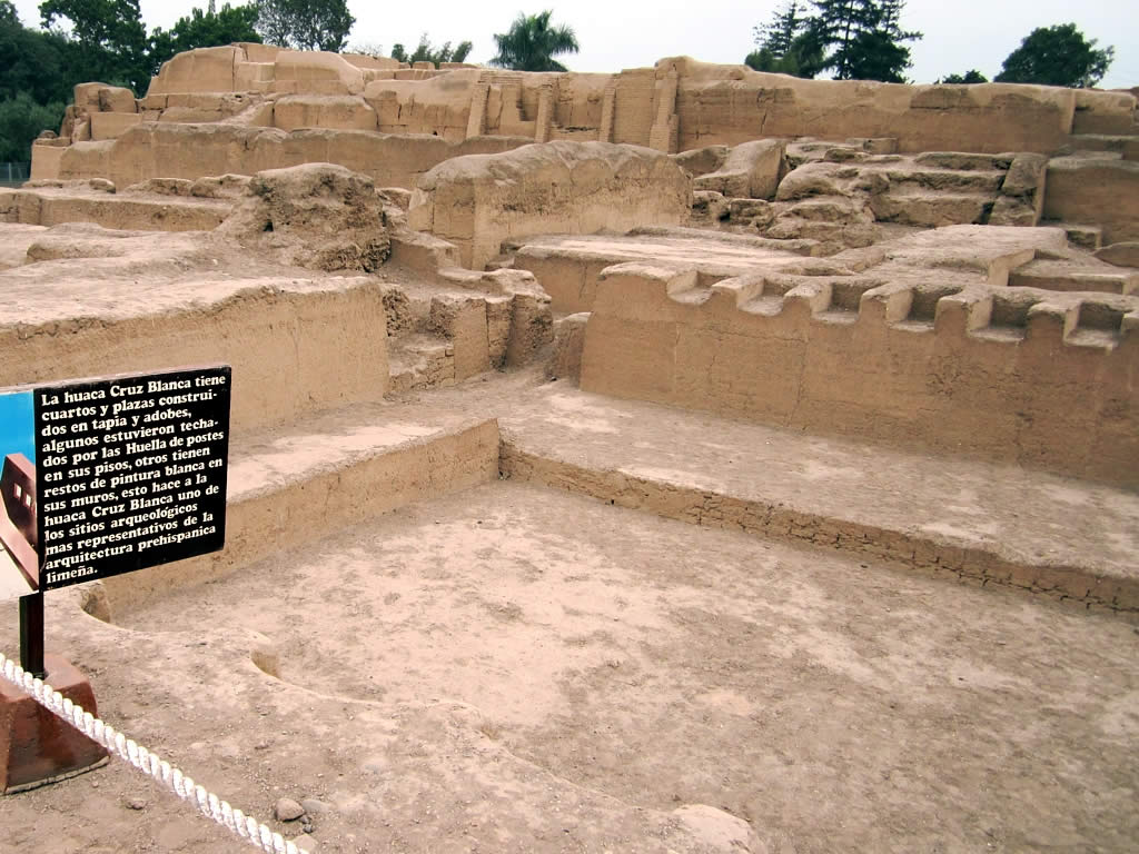 Huaca Cruz Blanca ubicada en el Parque de las Leyendas en Lima, Perú.